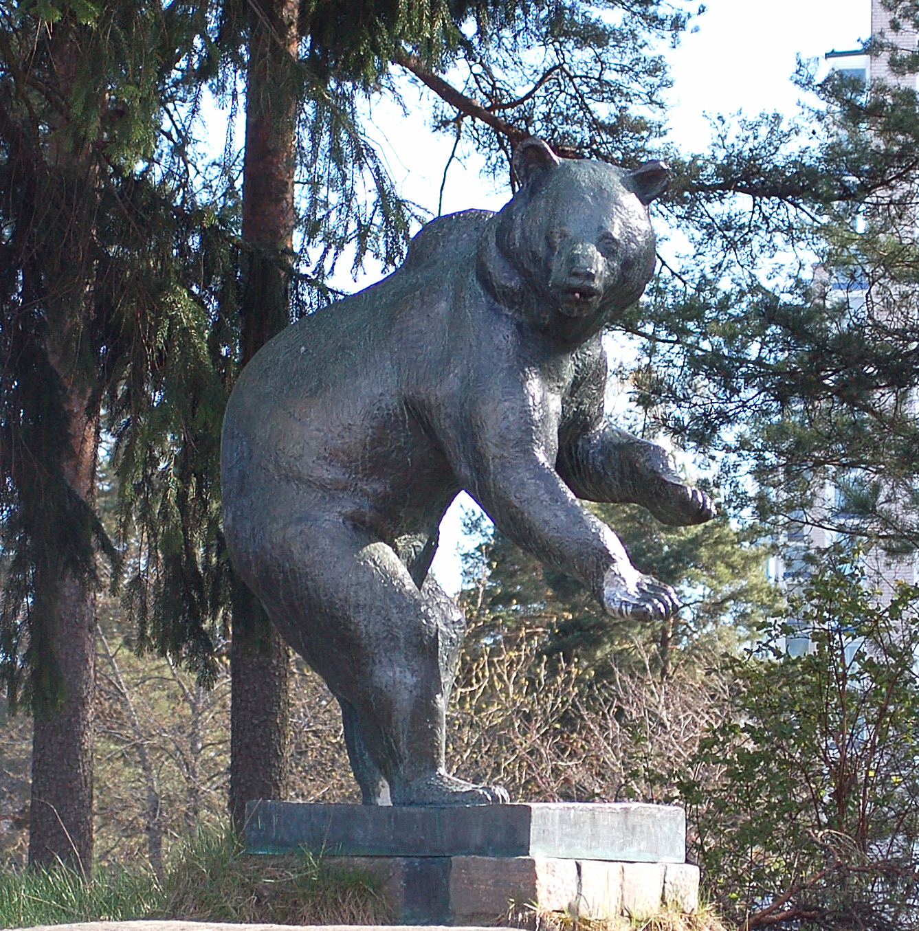 "Stående slagbjörn" av Arvid Knöppel placerad utanför Ruds vårdcentral, Karlstad.